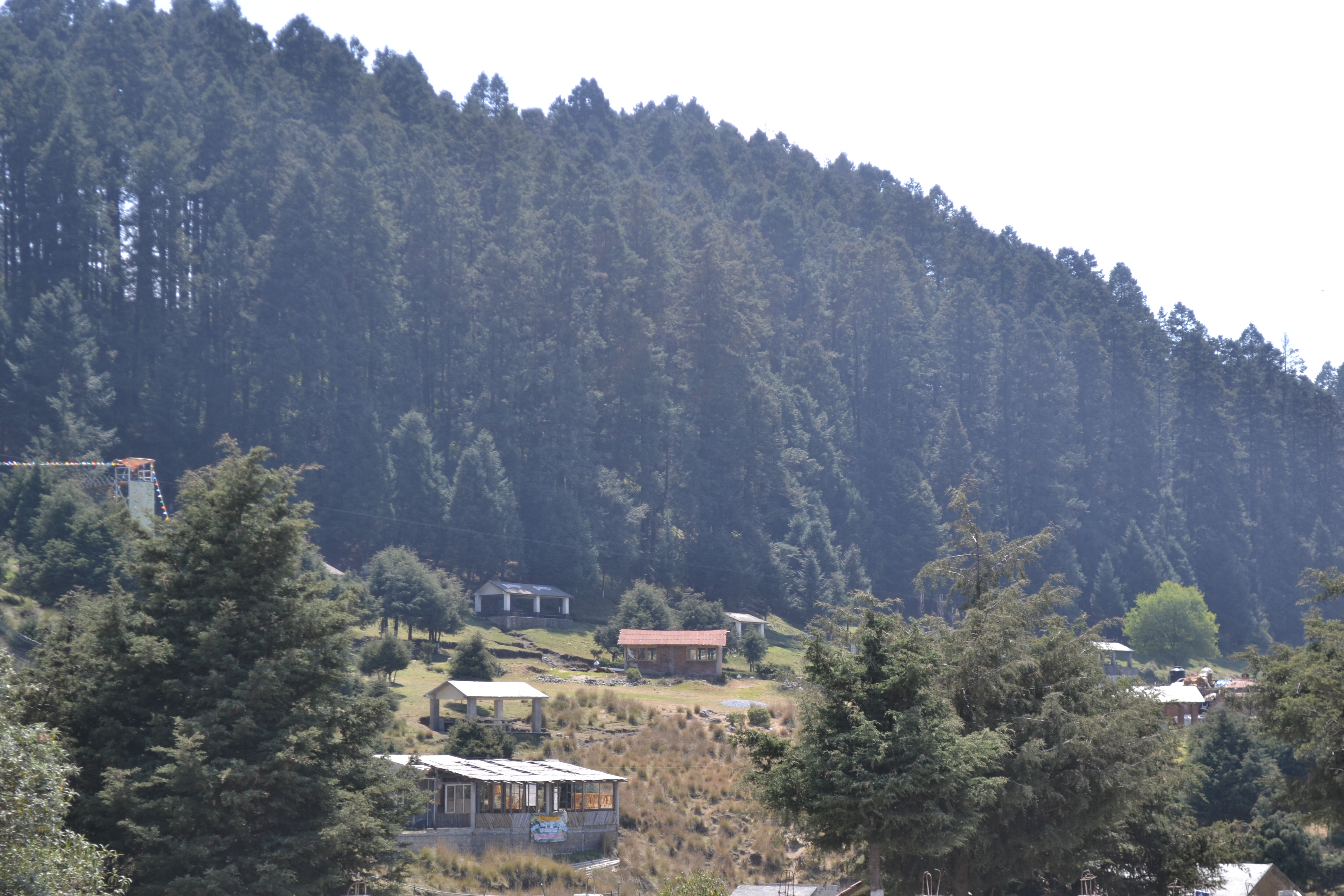 Arboles y cerros que rodean la Marquesa